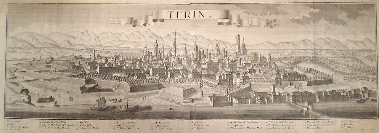 Veduta di Torino, impressa ad Augsburg nel 1731 da Georg Balthasar Probst.